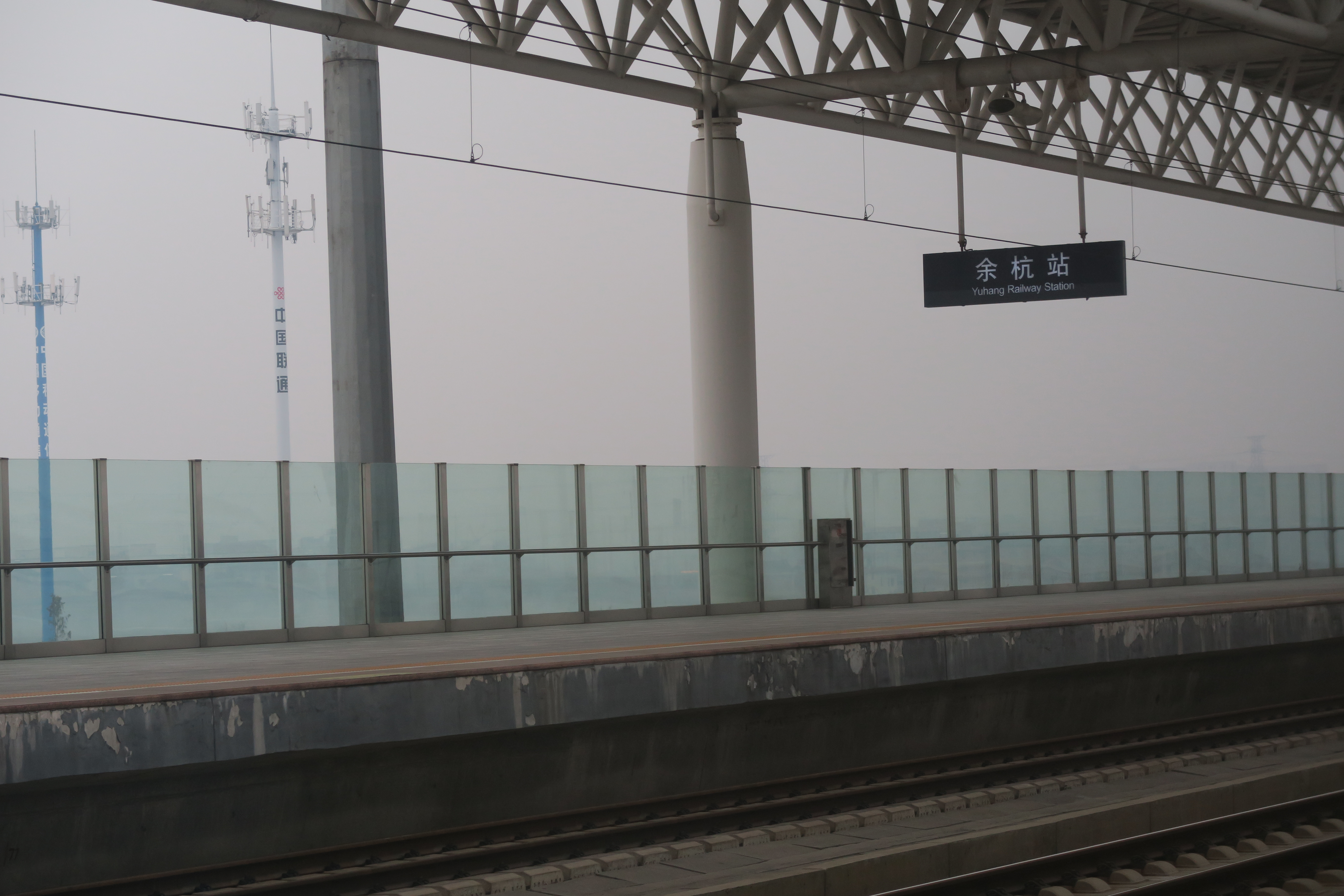 高铁余杭站站台